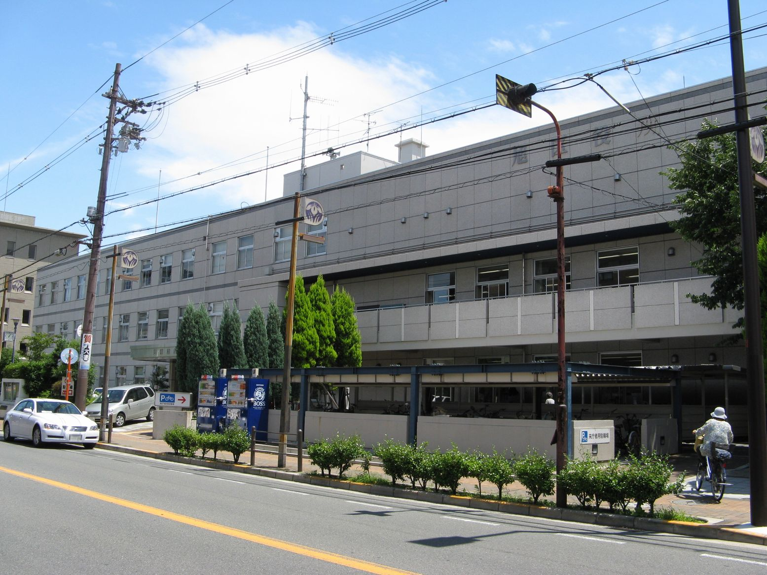 旭区役所